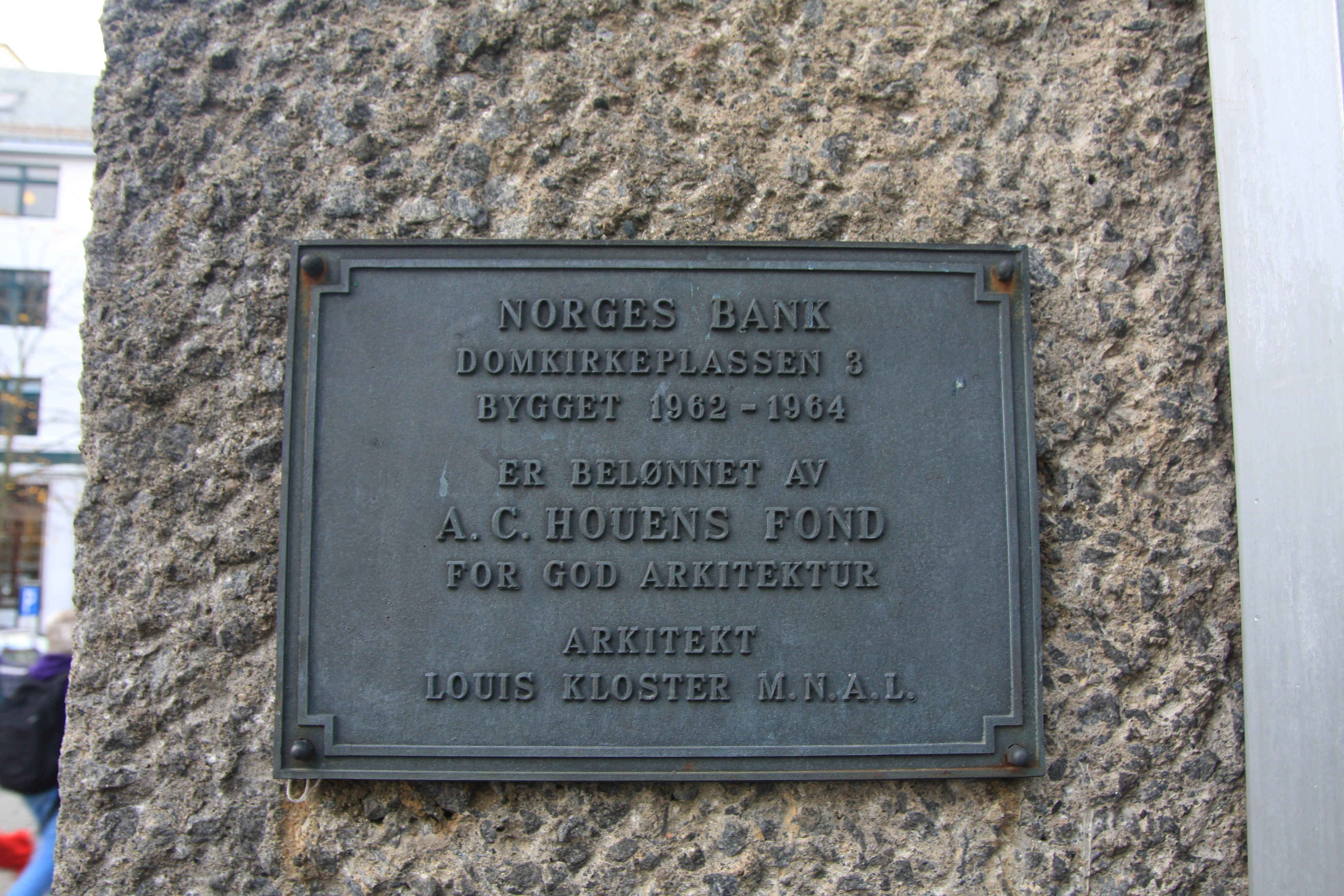 Norges Bank - Domkirkeplassen 3- Premieplakett